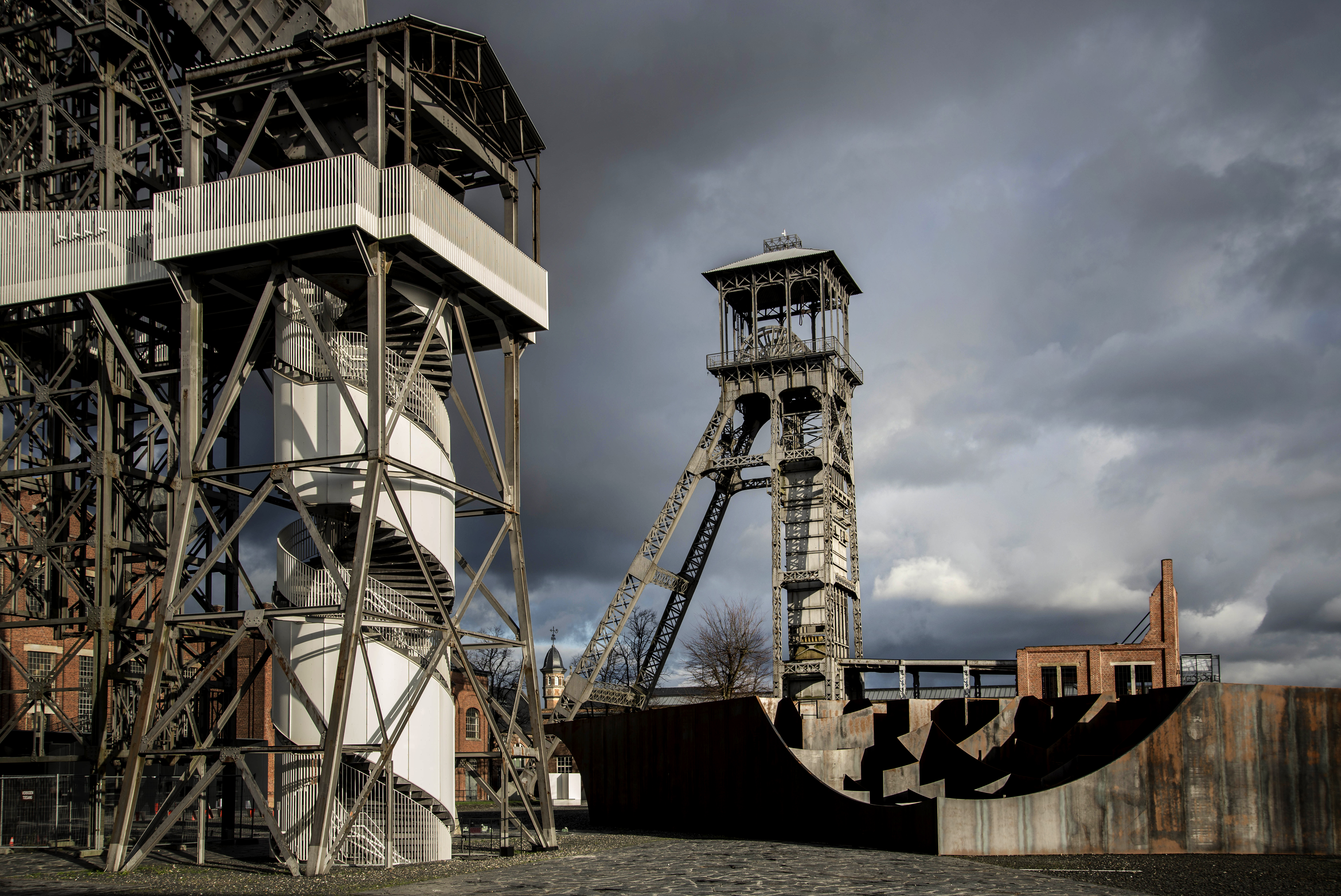 C-MINE Genk - beschermde mijngebouwen op het mijnterrein van Winterslag kregen een nieuwe culturele en toeristische bestemming. Onder de naam C-mine bieden ze onderdak aan de Media, Arts & Design faculty, Studio Pieter Stockmans en Euroscoop.